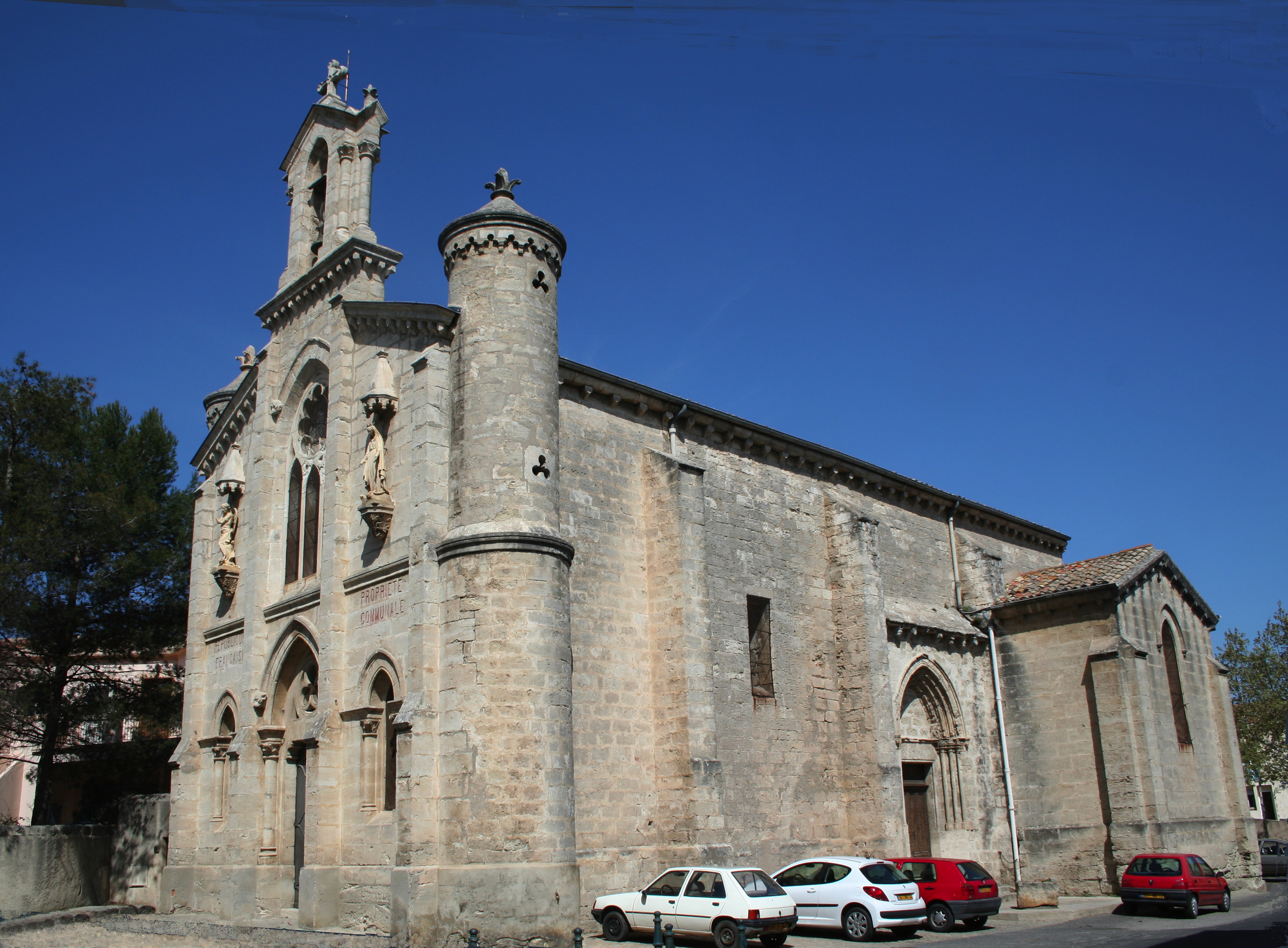 Església de Santa Caterina d'Alexandria de Lo Poget (Llenguadoc-Rosselló)